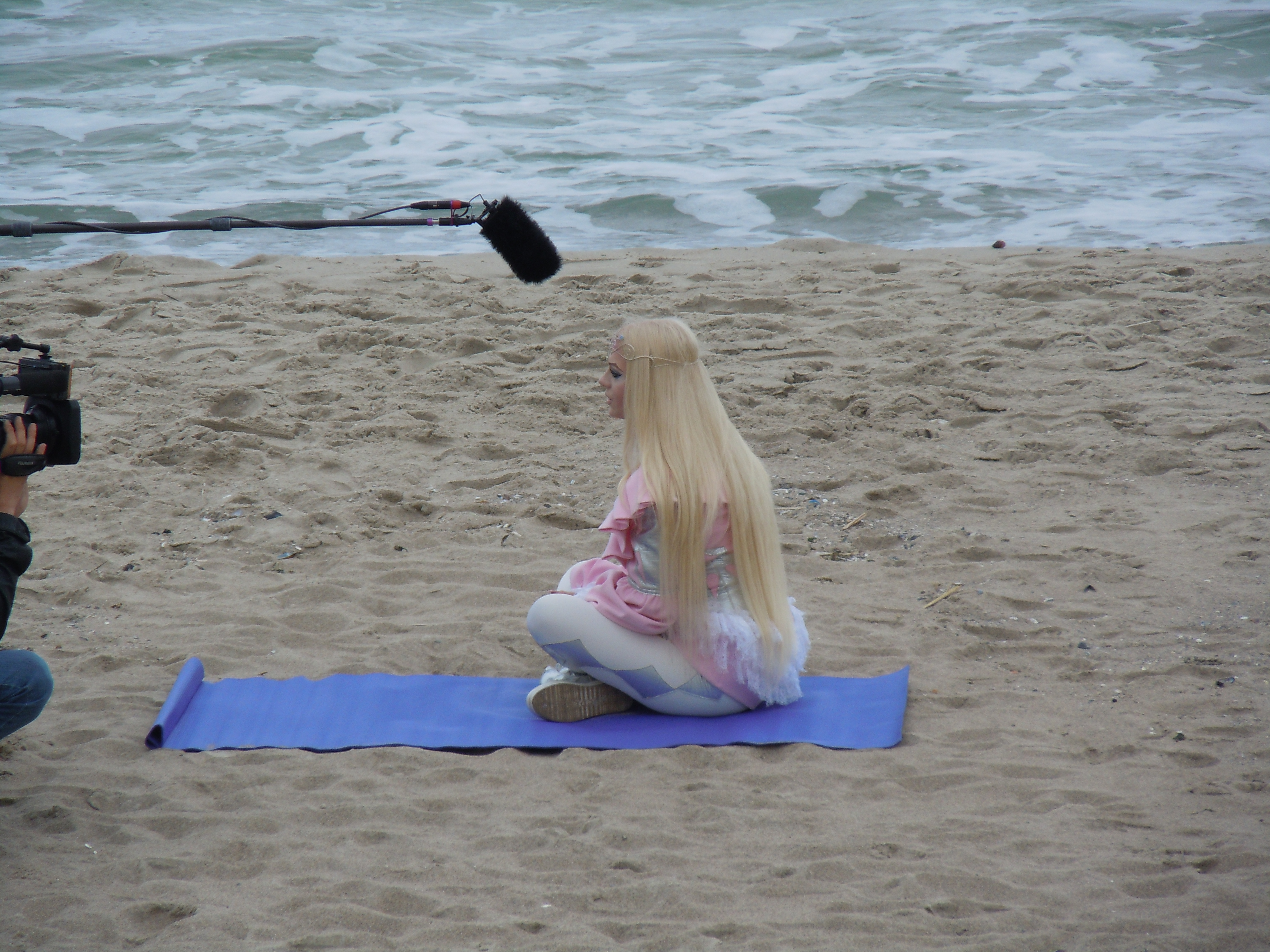 Дівчина на пляжі Отрада в Одесі